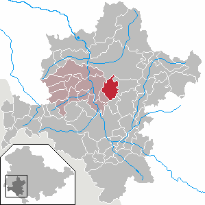 Metzels in Thuringia - District Schmalkalden-Meiningen